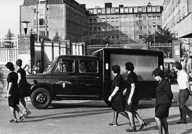 Quando Napoli sconfisse il colera nel 1973